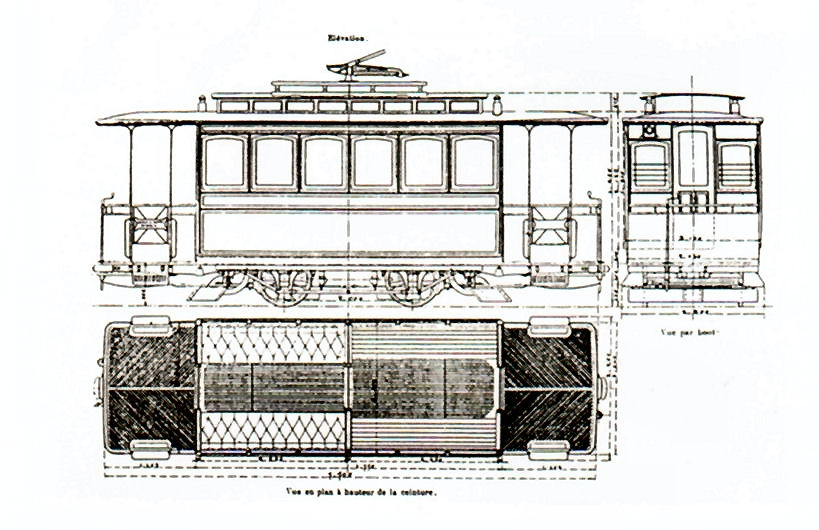 Automotrice du tramway du Havre